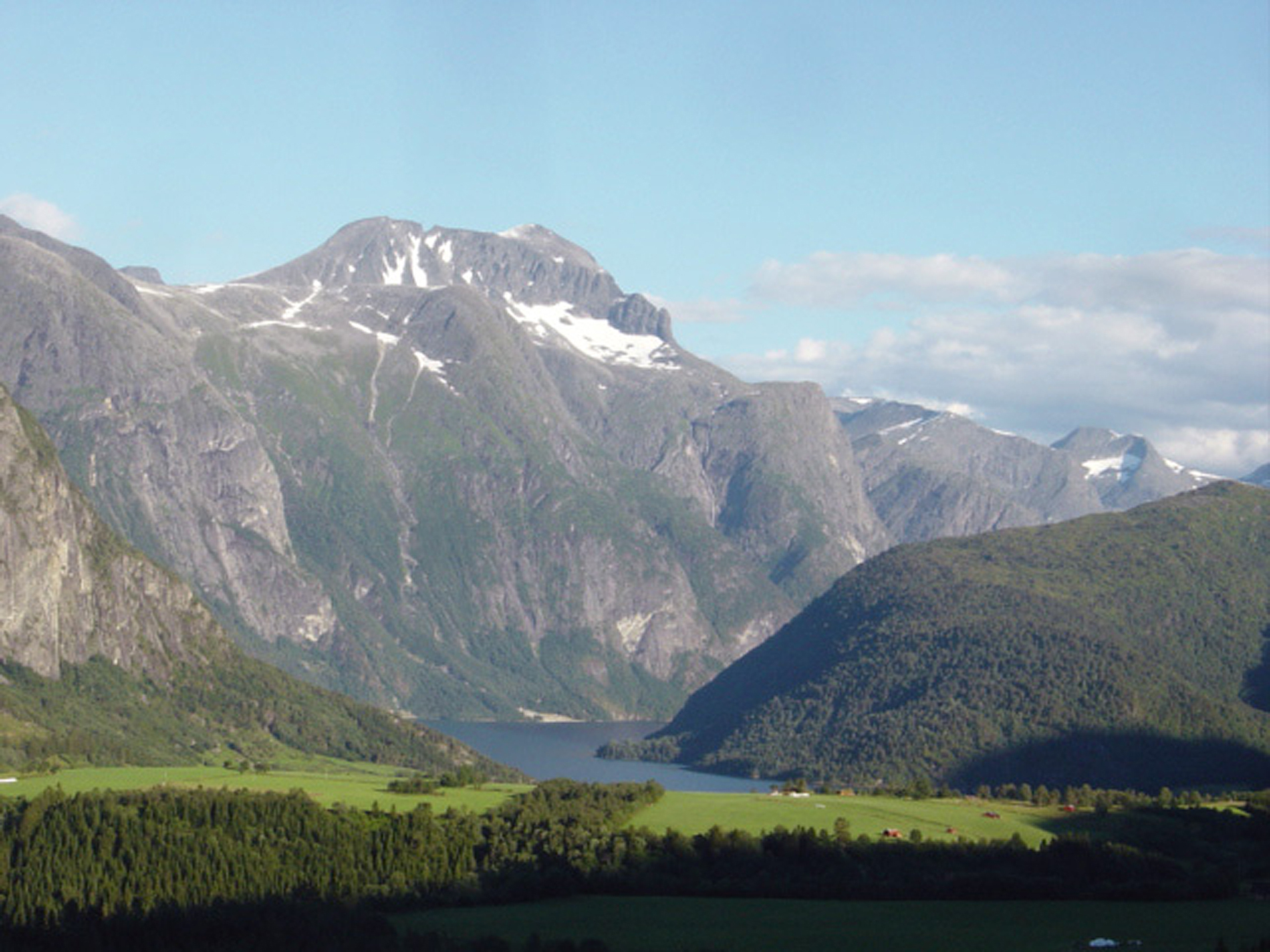 From Nesset and the Eresfjord and Eikesdalsvatnet